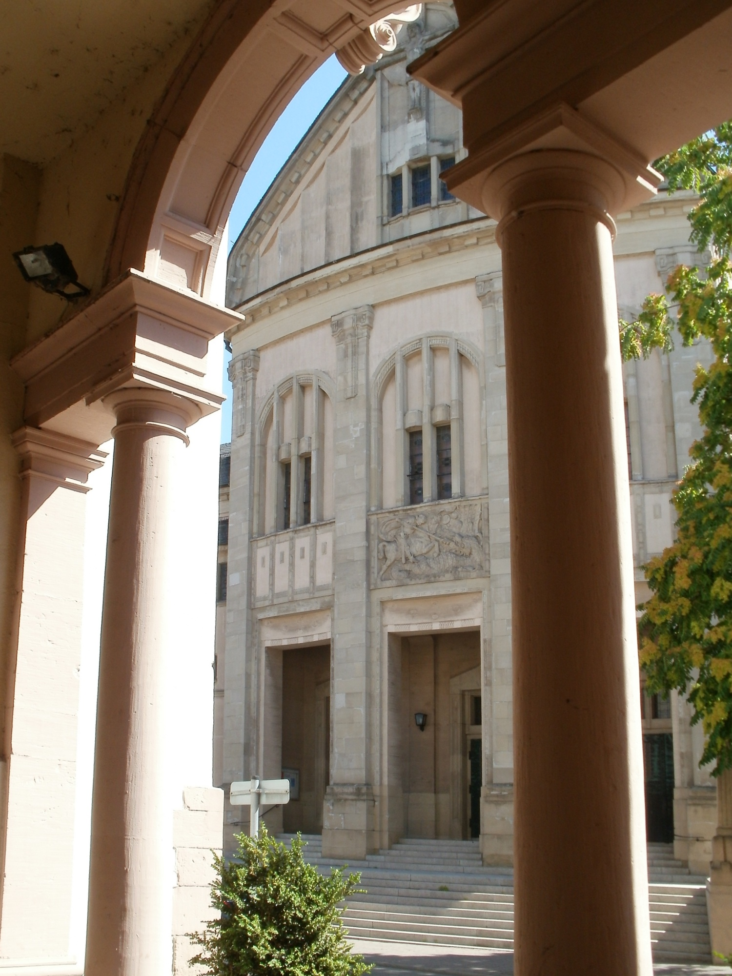 St. Christophorus (Hockenheim)